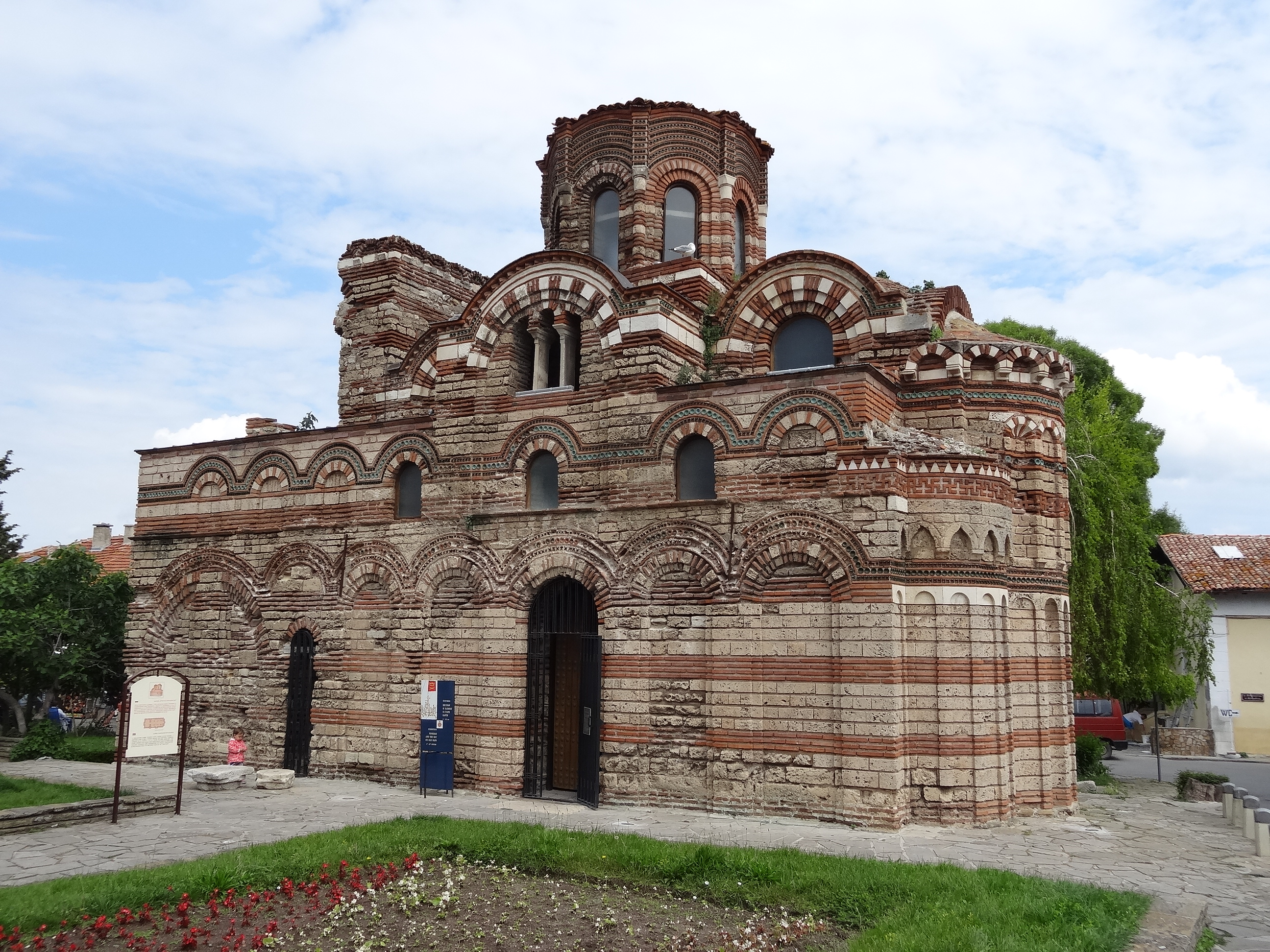 Church of Christ Pantocrator, Nesebar